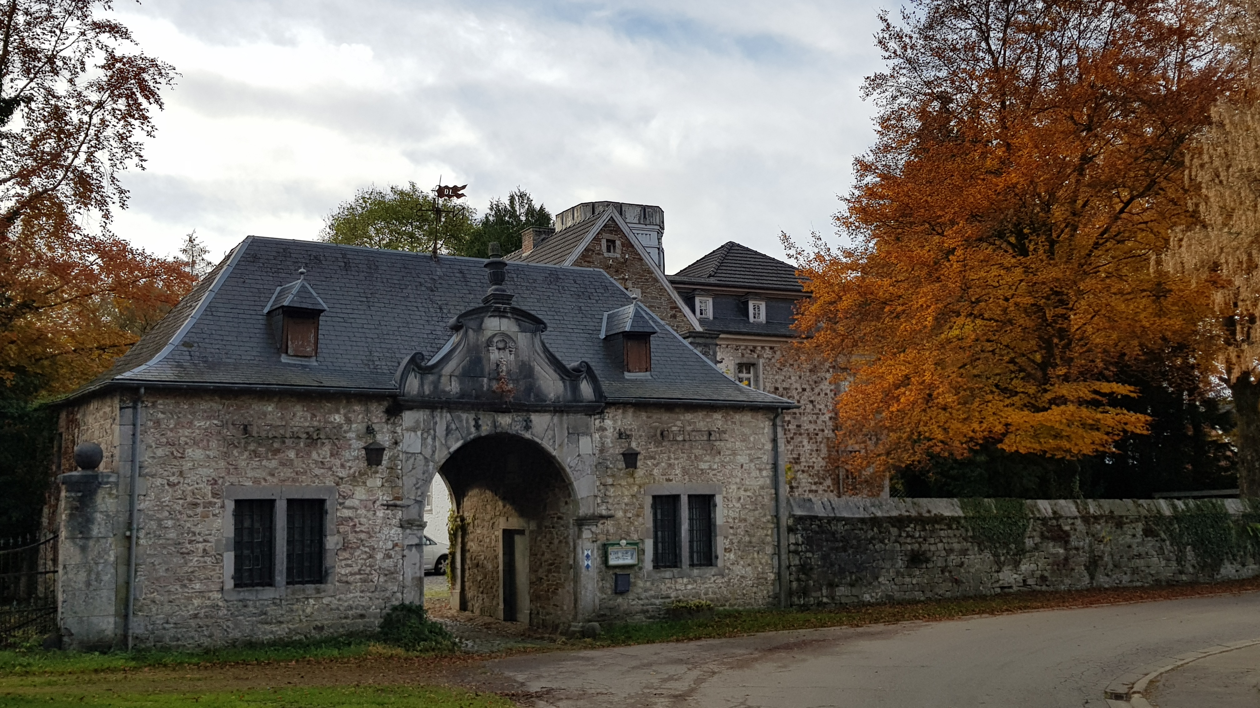 Schloss Thor, Astenet, Lontzen, Belgien This photo of immovable heritage has been taken in the Walloon Region